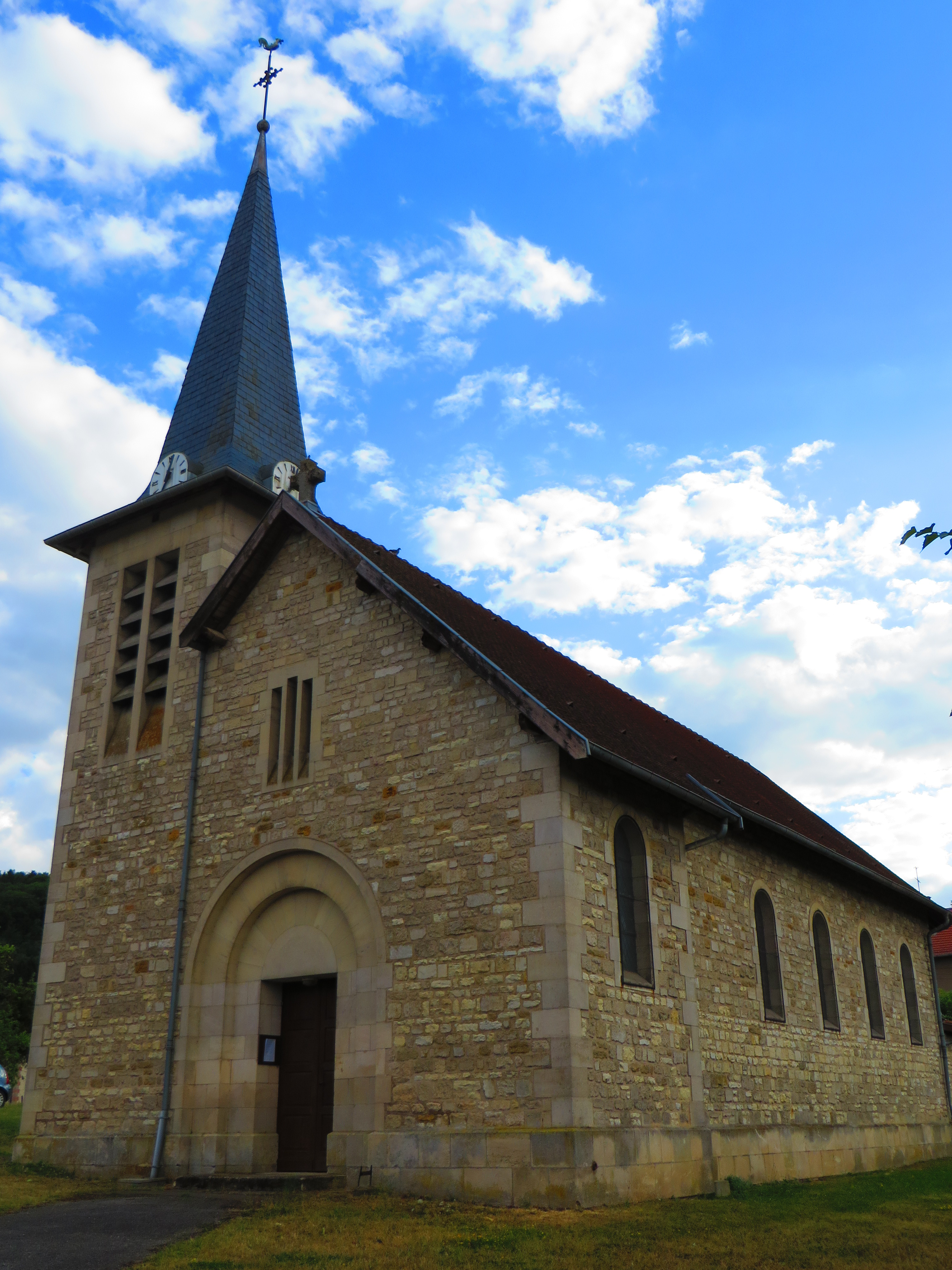 Combres-sous-les-Côtes L'église Saint-Étienne